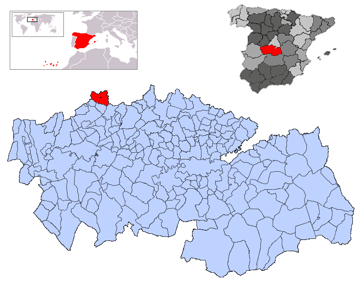 La Iglesuela en la provincia de Toledo